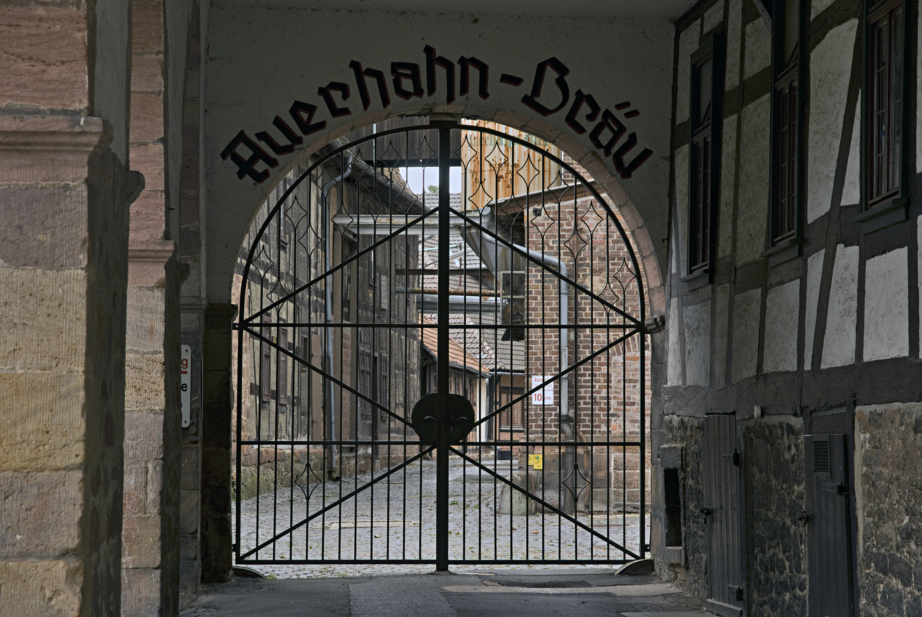 Auerhahn-Bräu